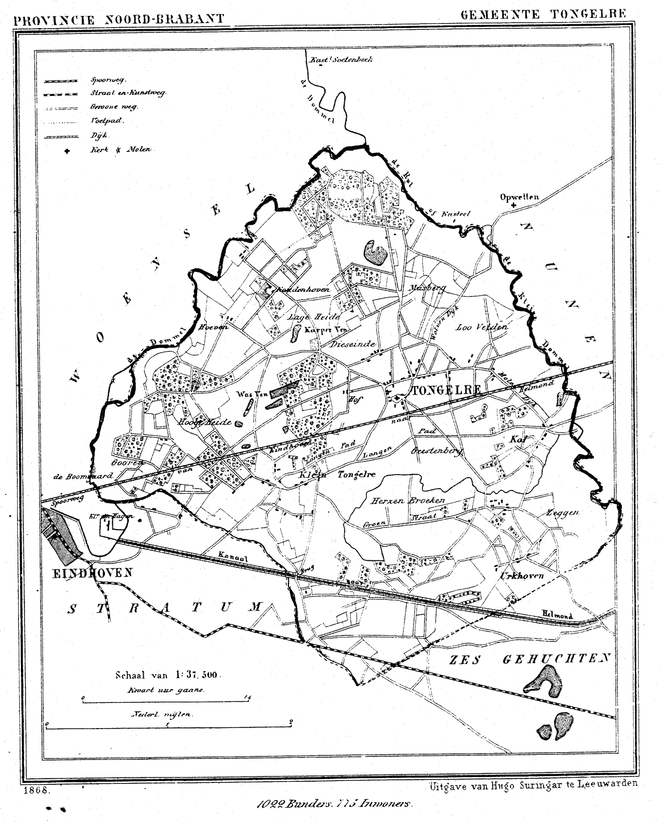 Nederland, Noord-Brabant, Gemeente Tongelre